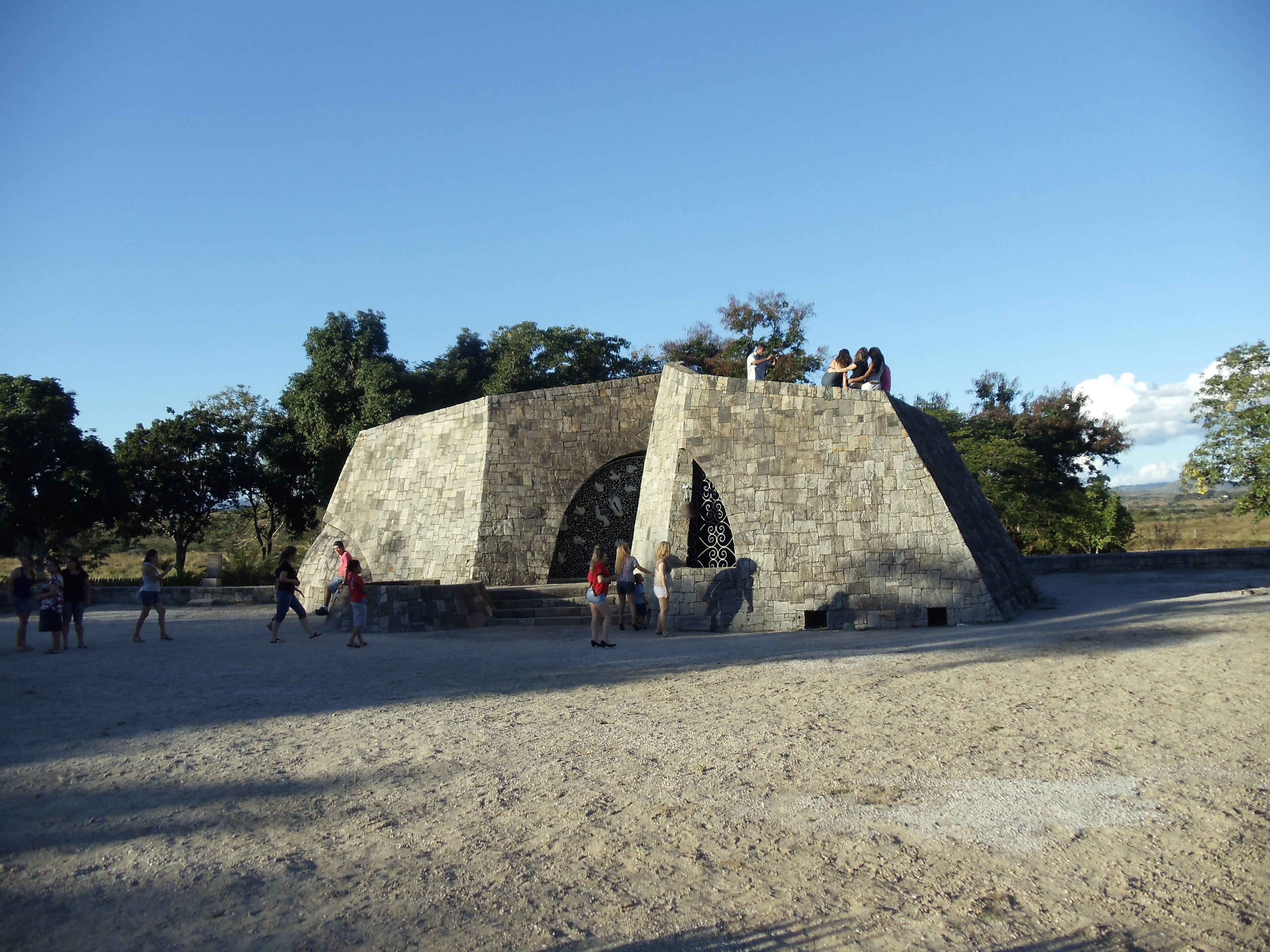 Capela do Menino Jesus no município brasileiro de Itapetinga, Bahia.